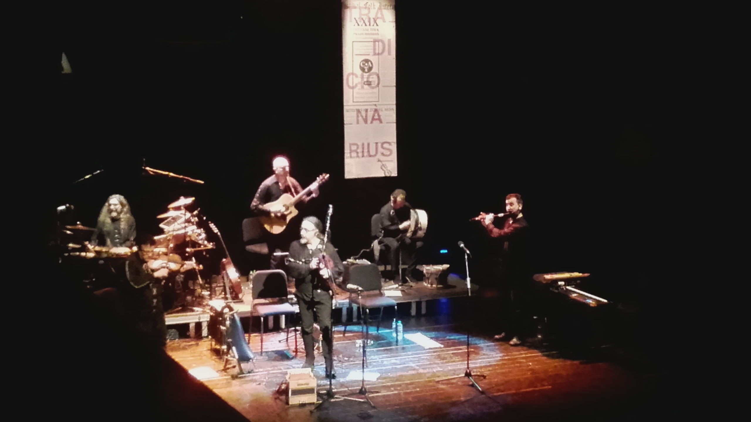 Luar na Lubre no Tradicionàrius o 26 de febreiro de 2016.